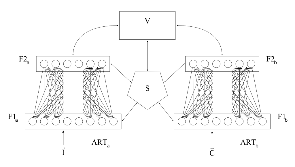 ARTMAP Structure